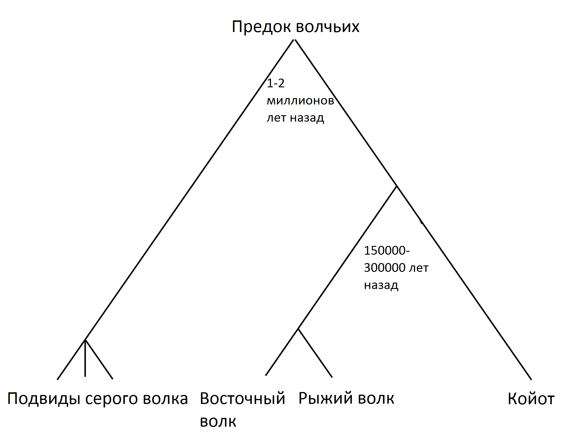 Схема эволюции североамериканских волков